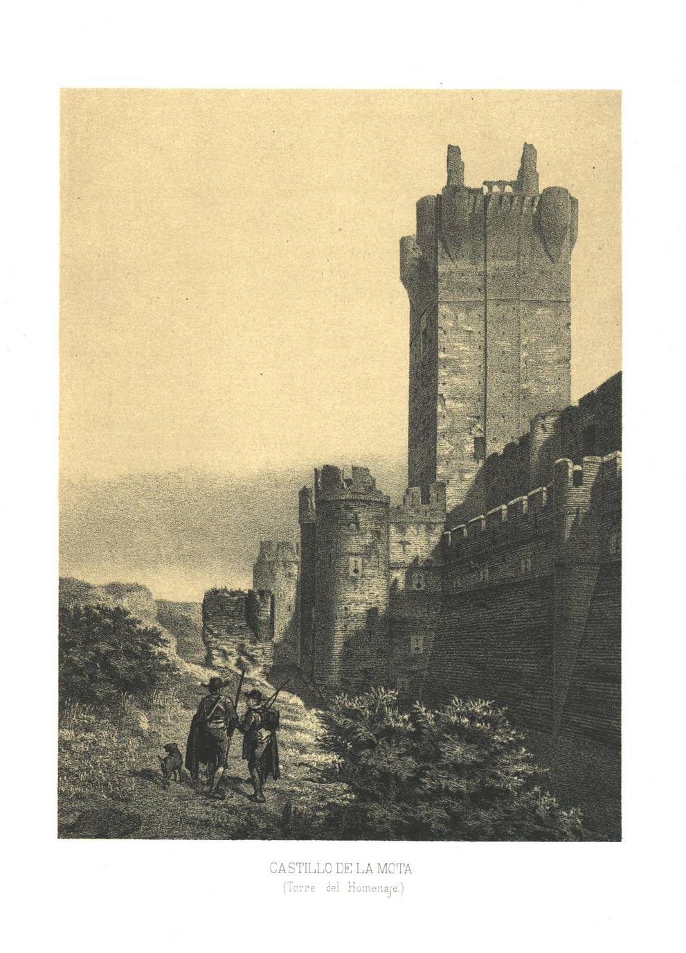 Litografía de Francisco Javier Parcerisa de la torre del homenaje del Castillo de la Mota en Medina del Campo, publicada en el año 1861.